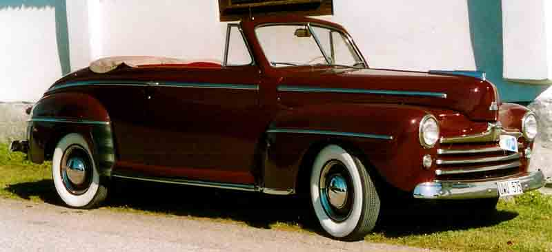 Ford V8 76 Super De Luxe Club Convertible Coupé 1947